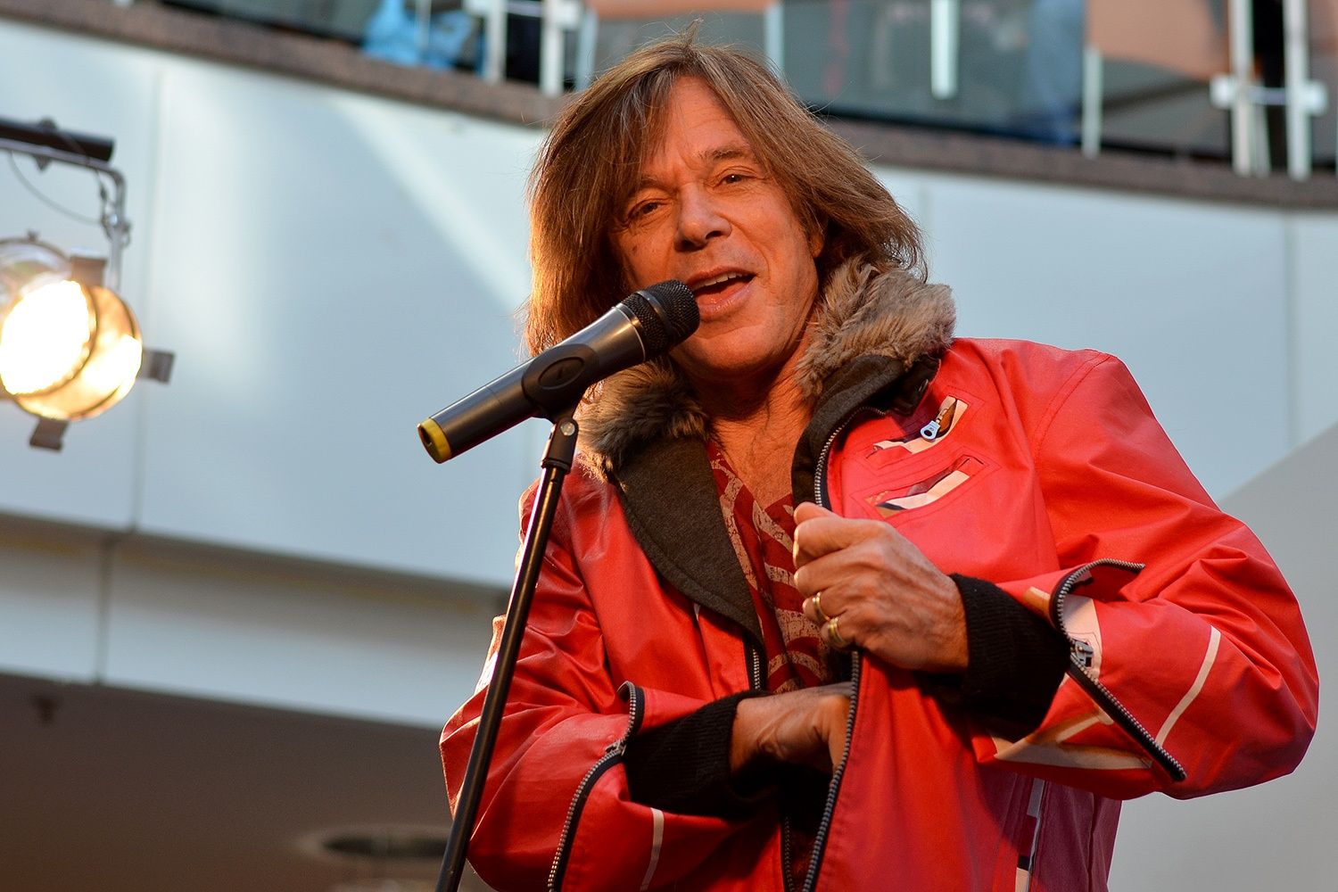 Jürgen Drews, Promotion-Tour, Allee-Center Hamm